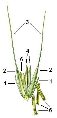 Blütenstand: Ährchen (Roggen)